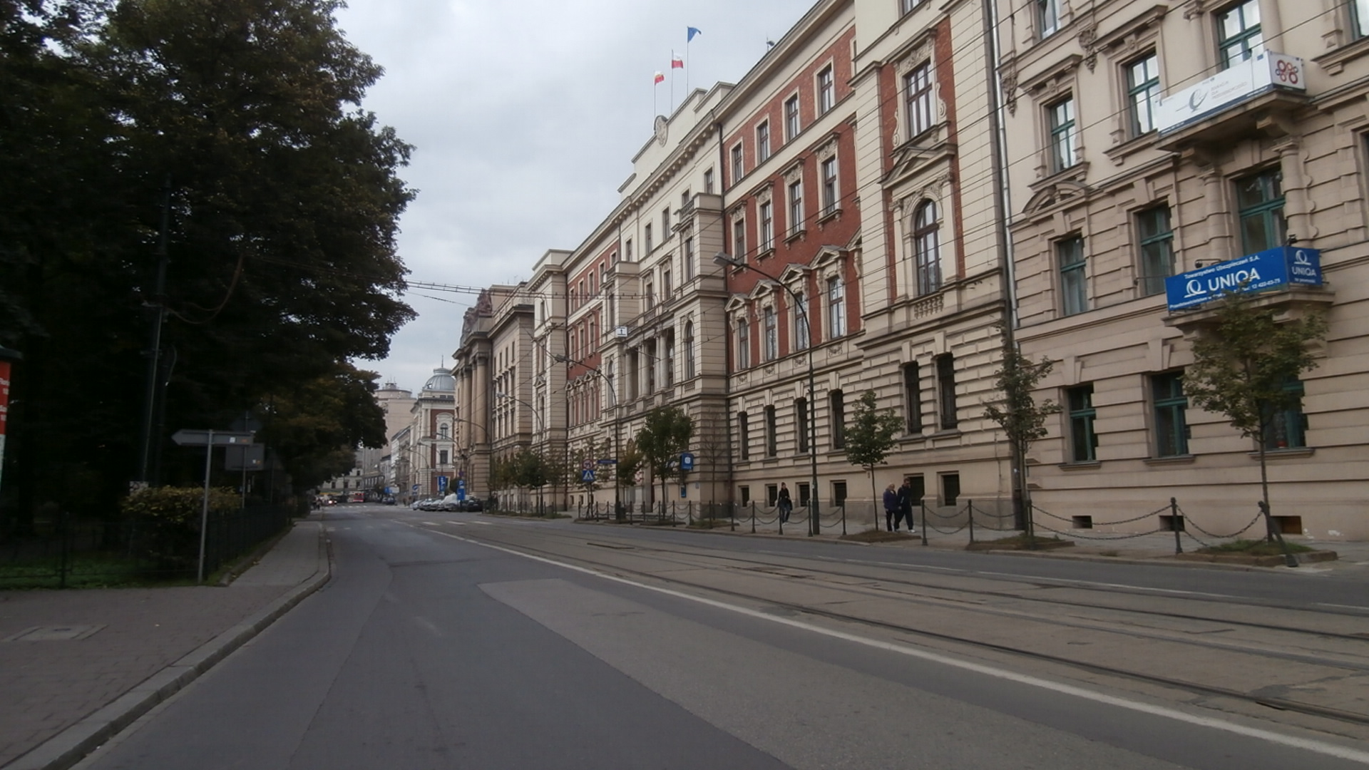 Ulica Basztowa w Krakowie, widok na zachód.